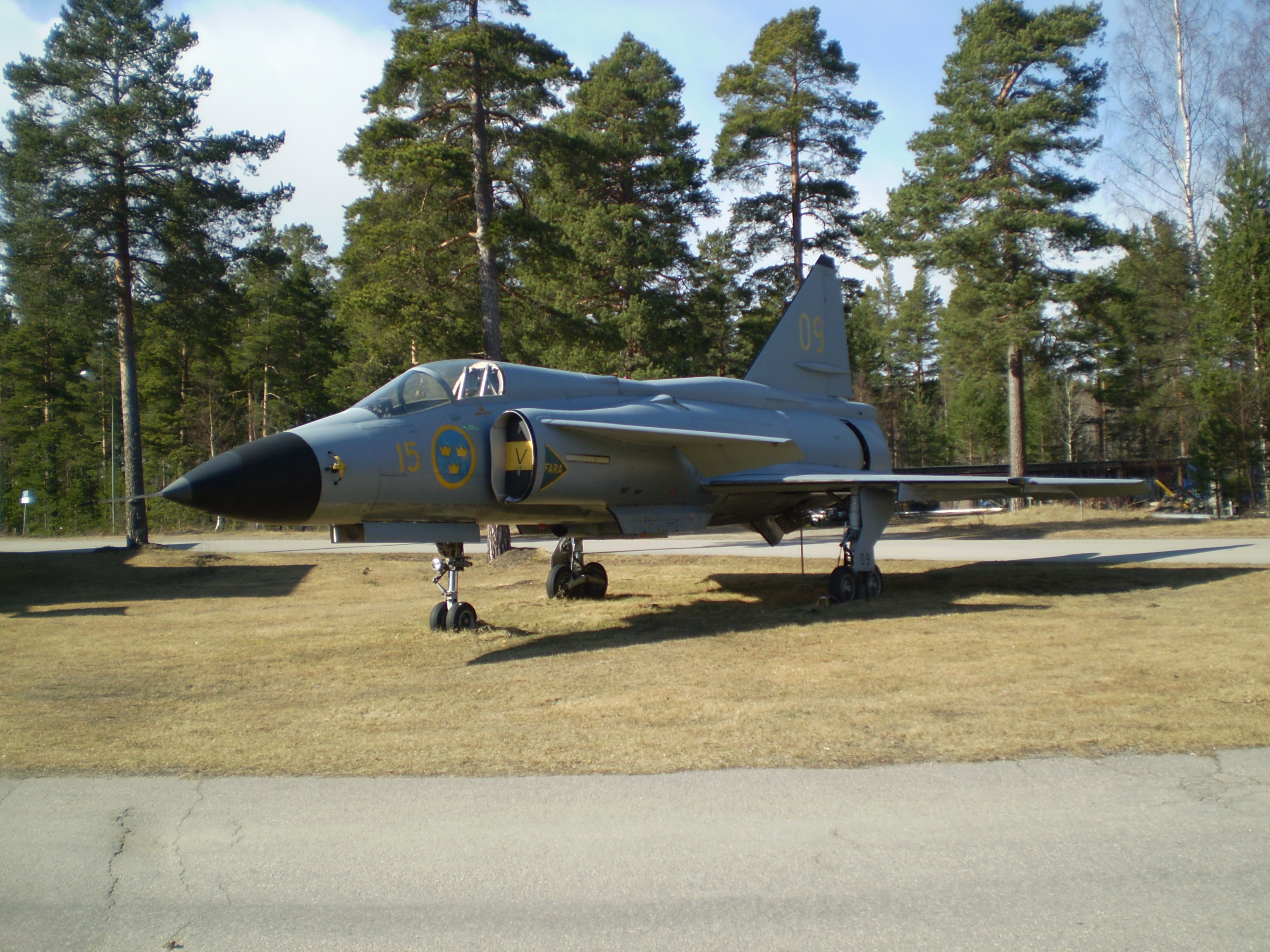 Flygplanstypen levererades ursprungligen till Flygvapnet som AJ 37 Viggen, och har tjänstgjort vid F 6, F 7, F 10 och F 15. Denna individ ingick i en grupp om 48 flygplan, vilka under åren 1991-1994 modifierades till AJS 37 Viggen. Flygplanstypen togs officiellt ur tjänst år 1997. Denna individ finns bevarad på F 15 Flygmuseum i Söderhamn.